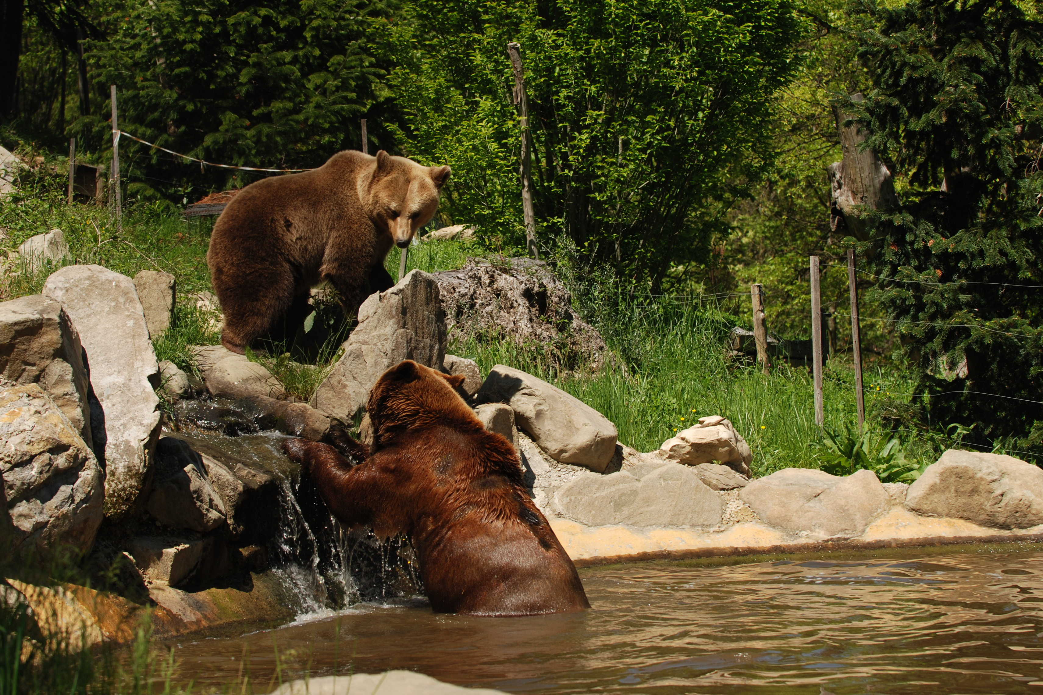 Gli orsi bruni giocano nel loro reparto